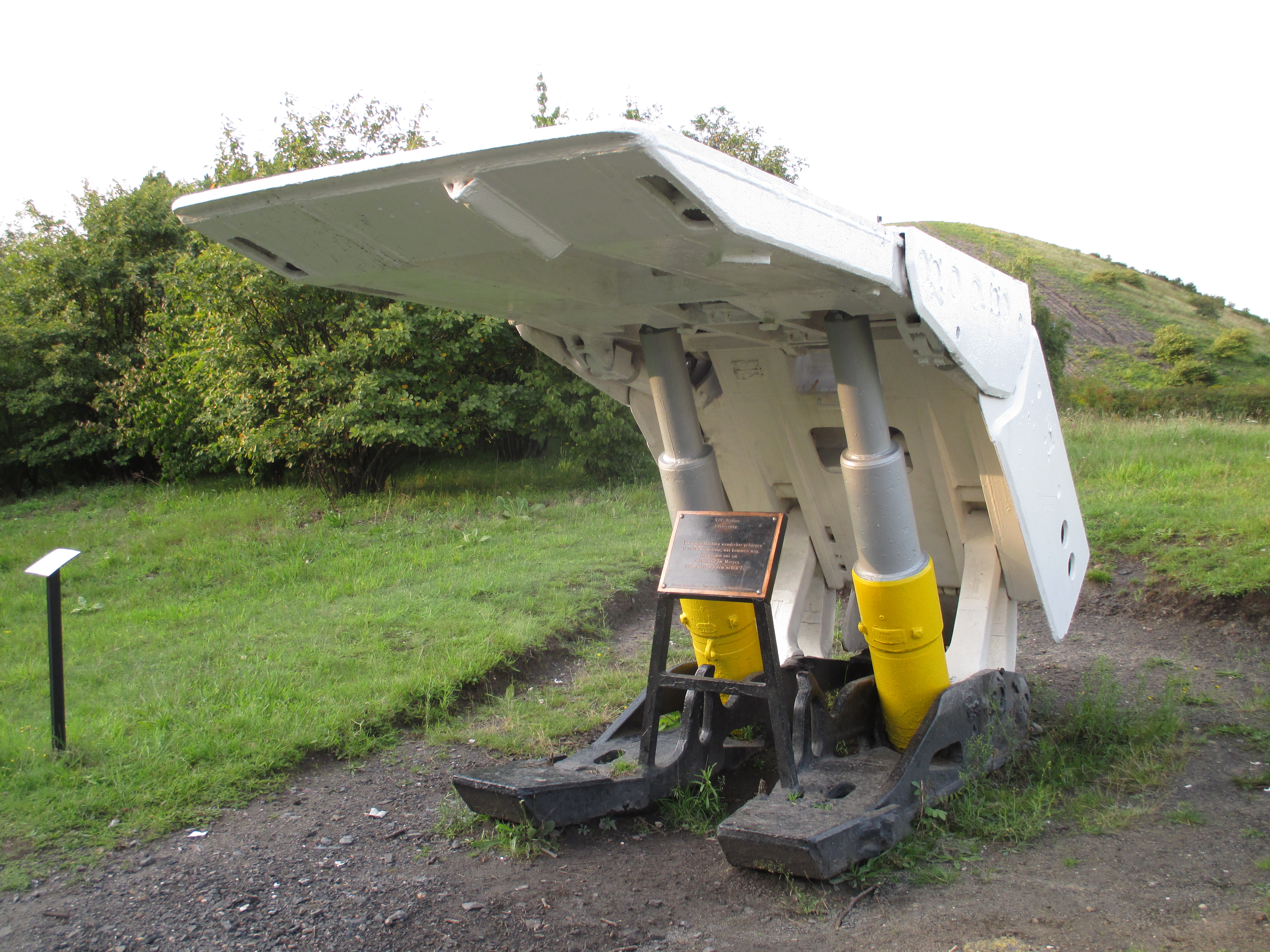 Station 14 des Bergbaukreuzweges an der Halde Haniel in Bottrop.